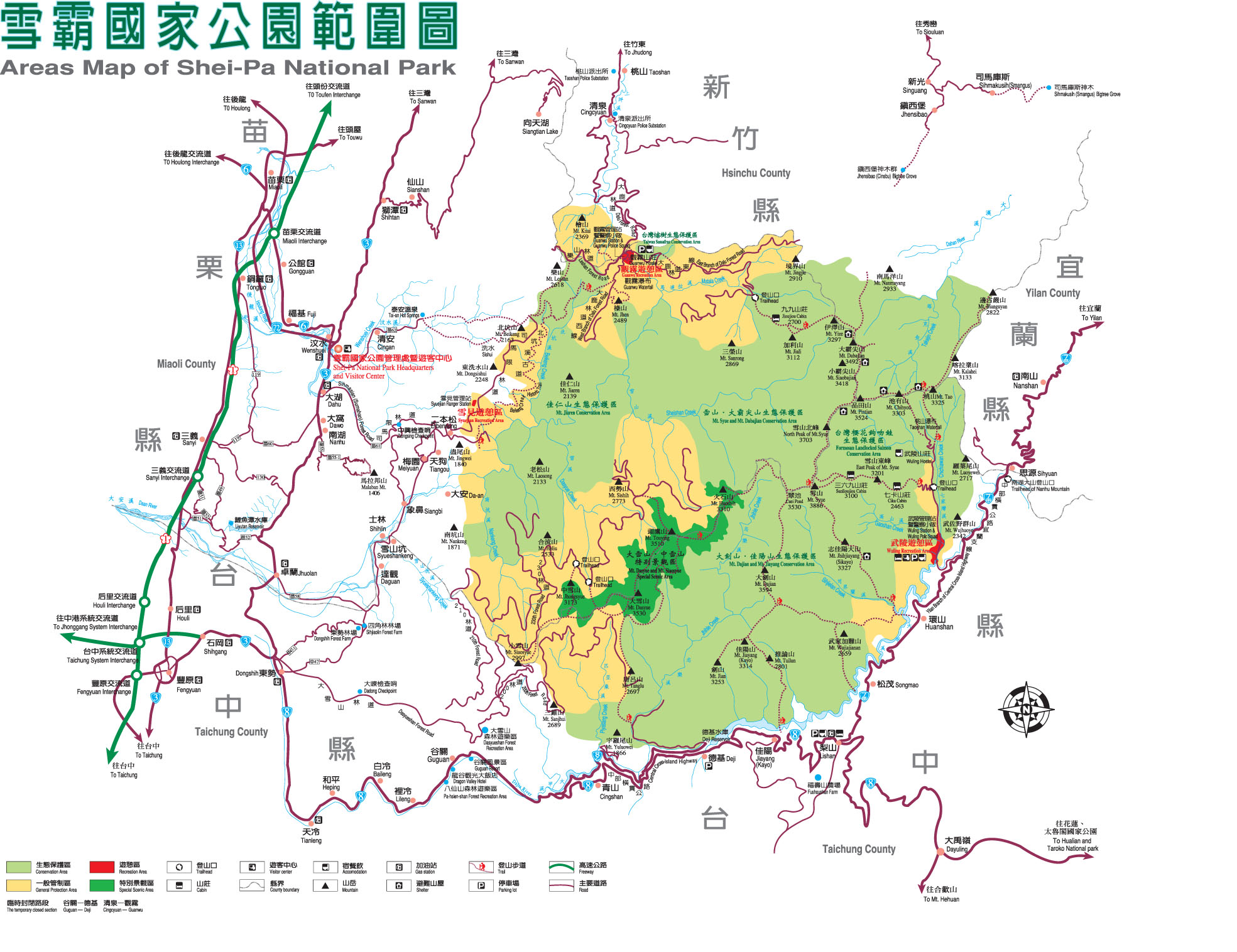 雪霸國家公園範圍圖